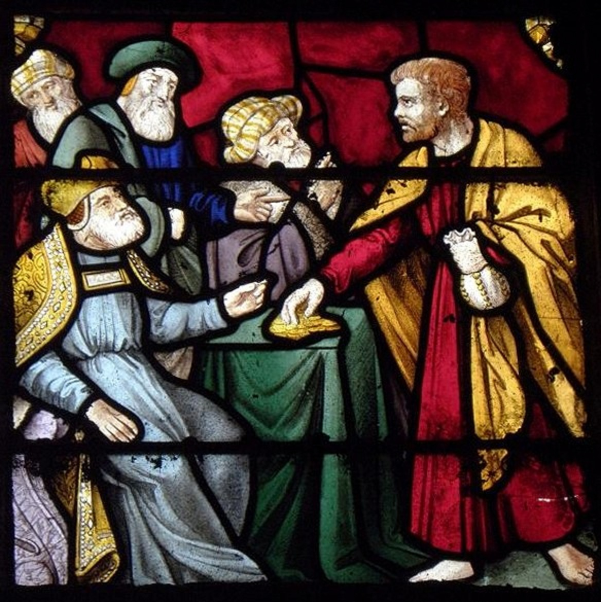 Trahison de Judas recevant les trente deniers. 1er registre, 4ème scène. Maîtresse-vitre de l'église Saint-Ouen aux Iffs (35).